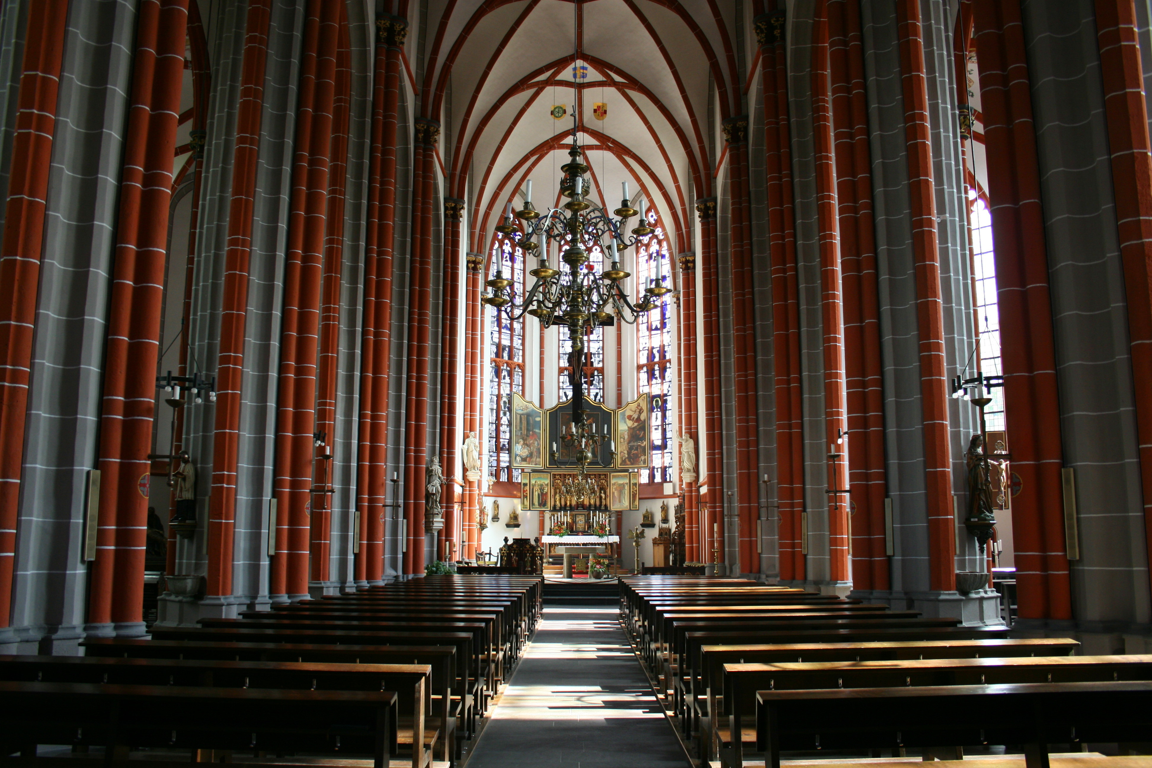 Sankt Peter und Paul in Kranenburg